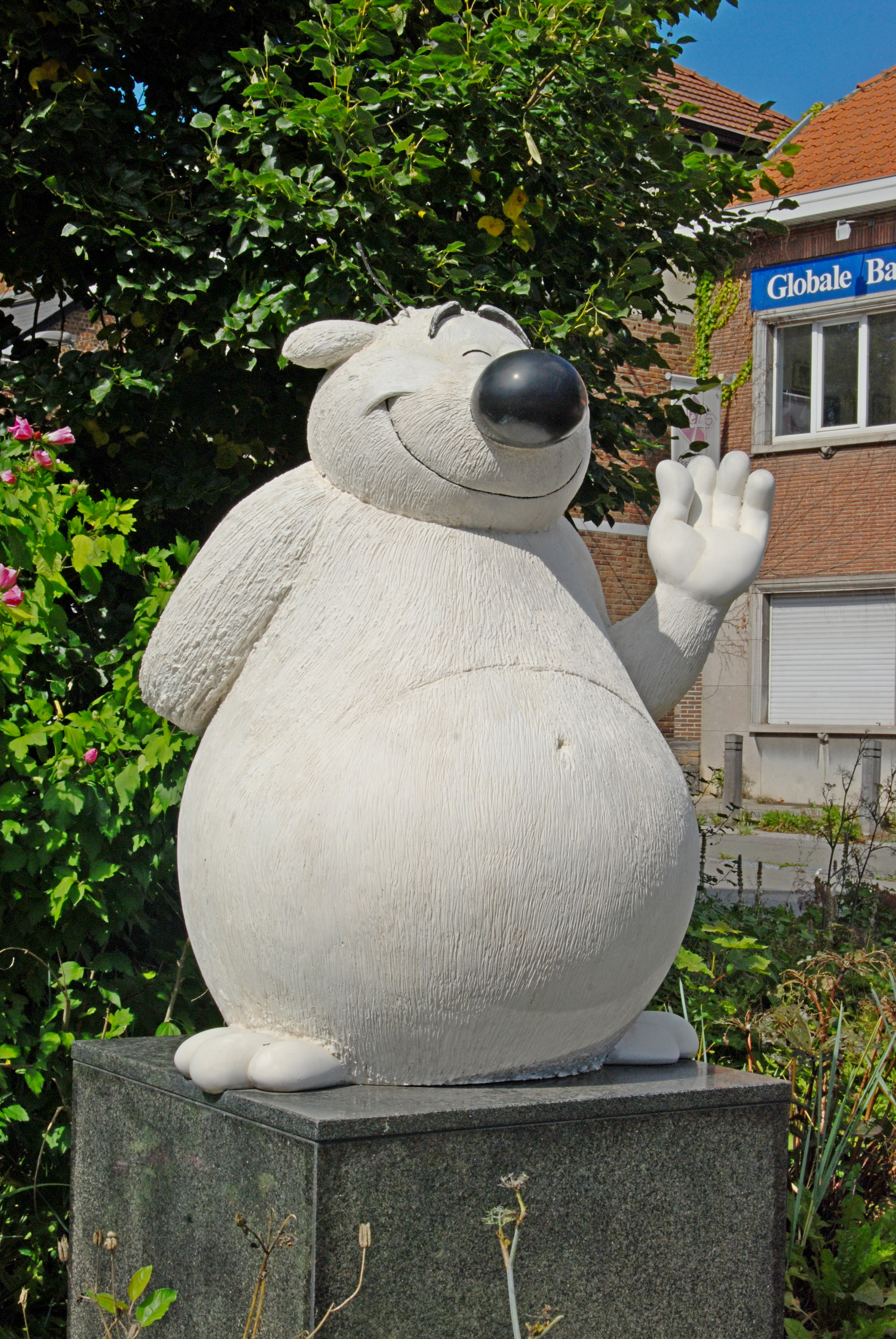 Cubitus-Statue in Limal (Wallonien)